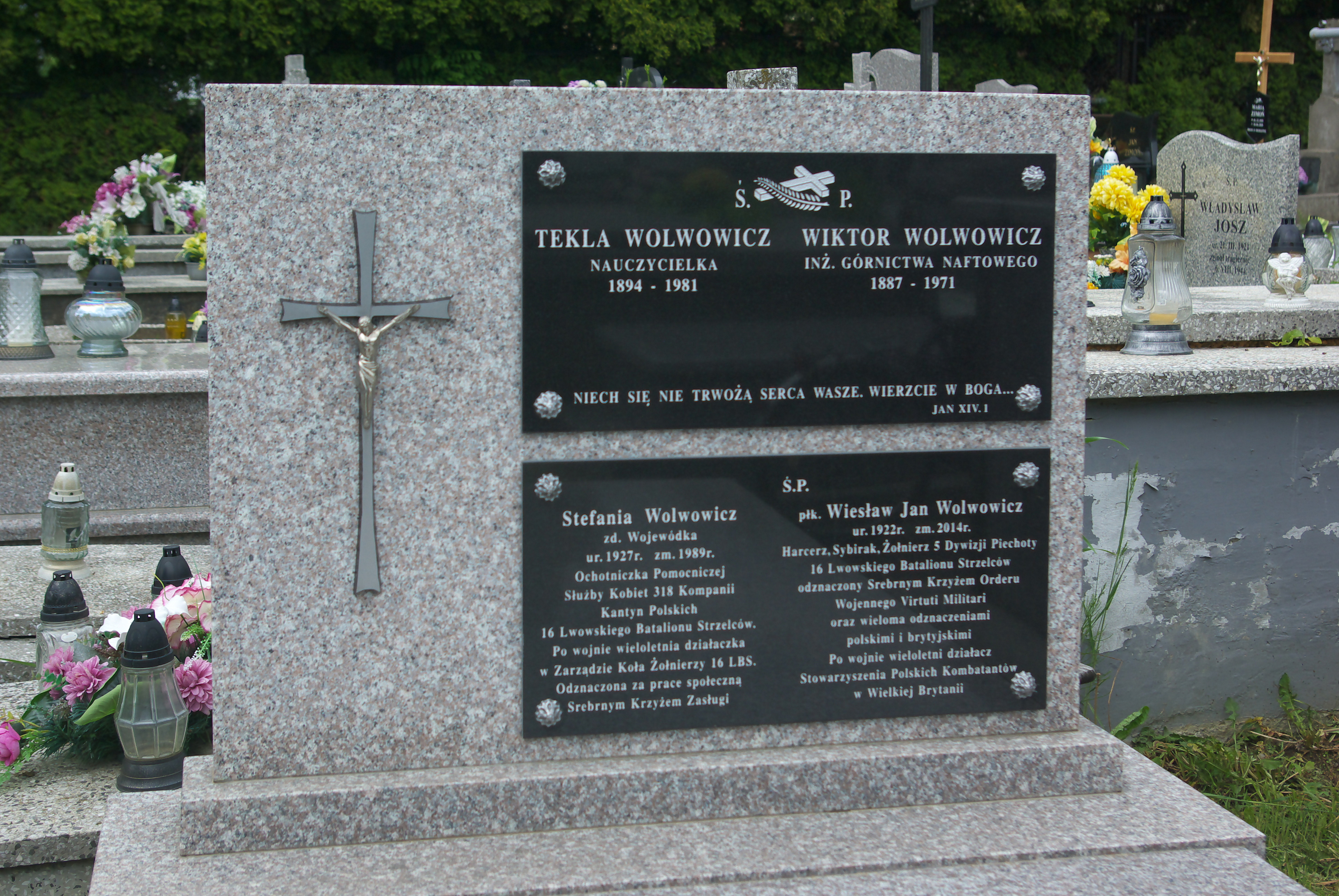 Grobowiec rodziny Wolwowiczów (Tekla, Wiktor, Wiesław) na Cmentarzu Centralnym w Sanoku (2020).